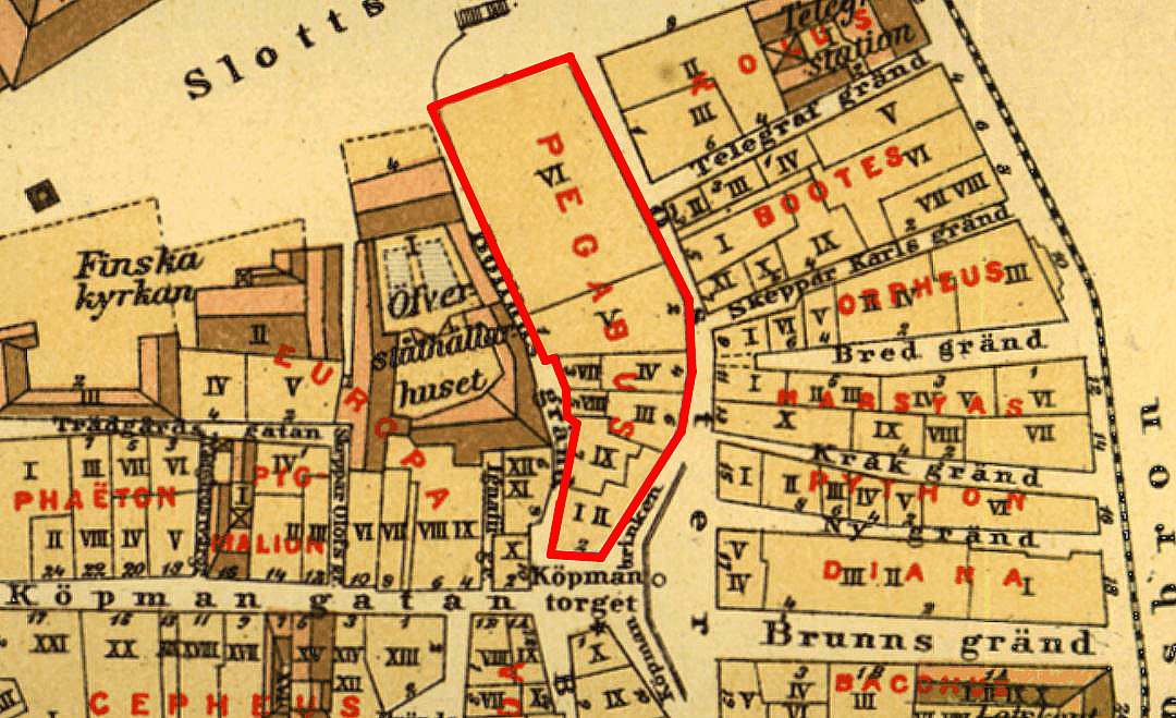 Alfred Rudolf Lundgrens Stockholmskarta visande kvarteret Pegasus i Gamla stan